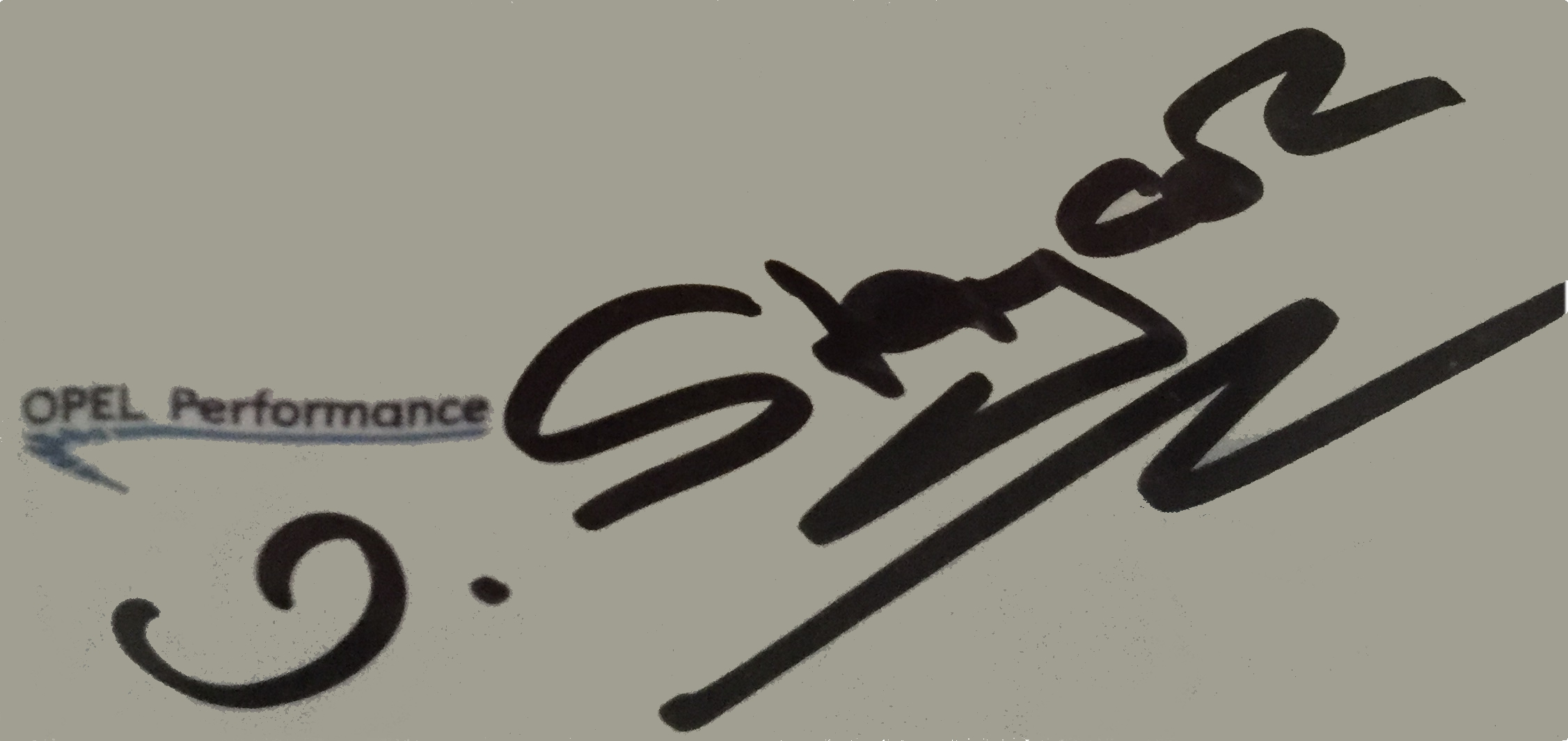 originales Autogramm von 2004